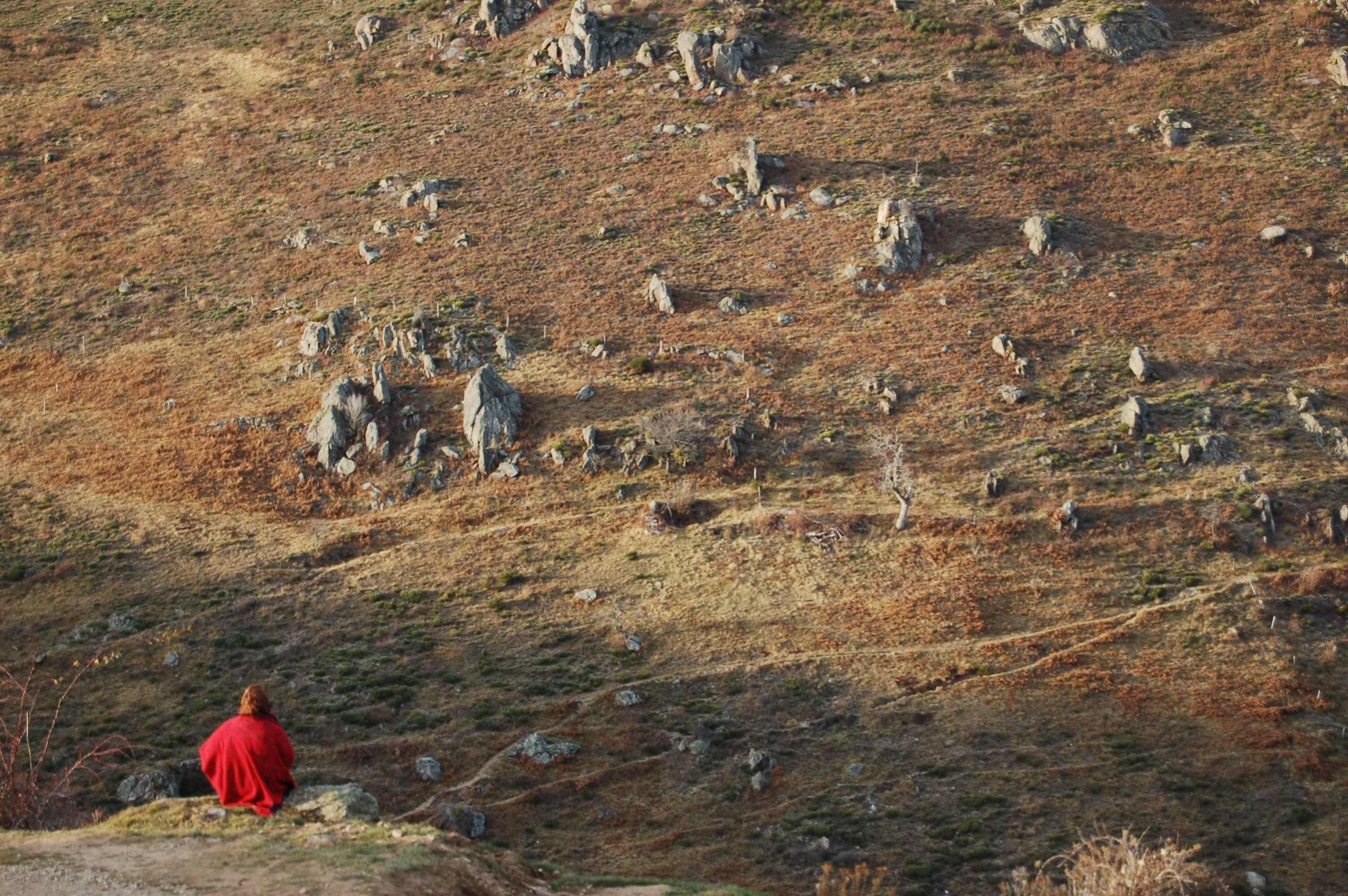 Belle carte de voeu ! En comparaison de la photo du Bénéfice, difficile de penser que ce paysage est à 2 km. A l'Esplot, on est nulle part. La photo rend bien l'ambiance avec une absence de perspective et une présence derrière les rochers. Le premier plan ajoute à l'idée d'un paysage à contempler.